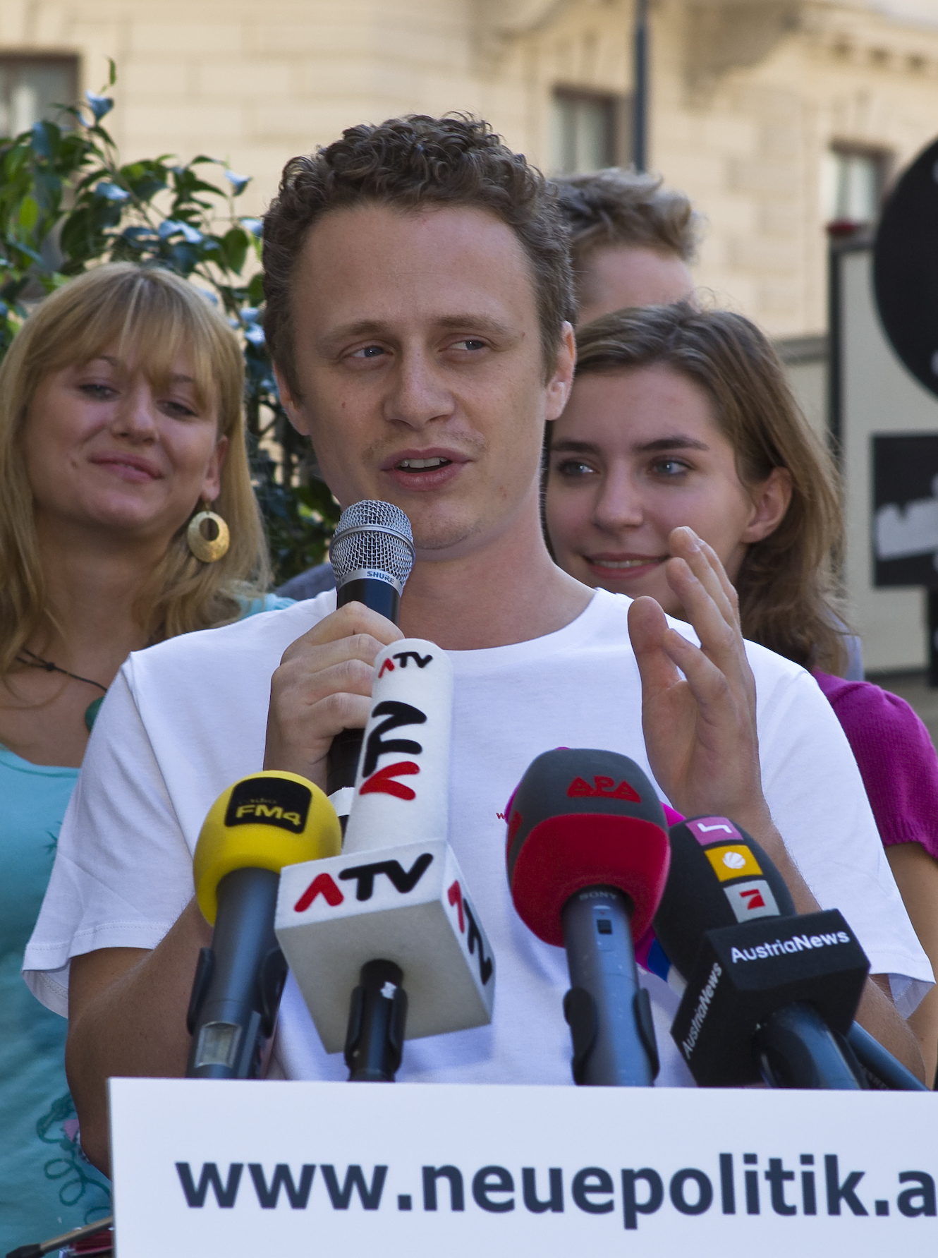 Peko Baxant und Jugendsprecherin Laura Rudas sowie SPÖ-Vorsitzender Werner Faymann präsentieren das SPÖ Jugendprogramm: Neue Politik. Foto: Thomas Lehmann.